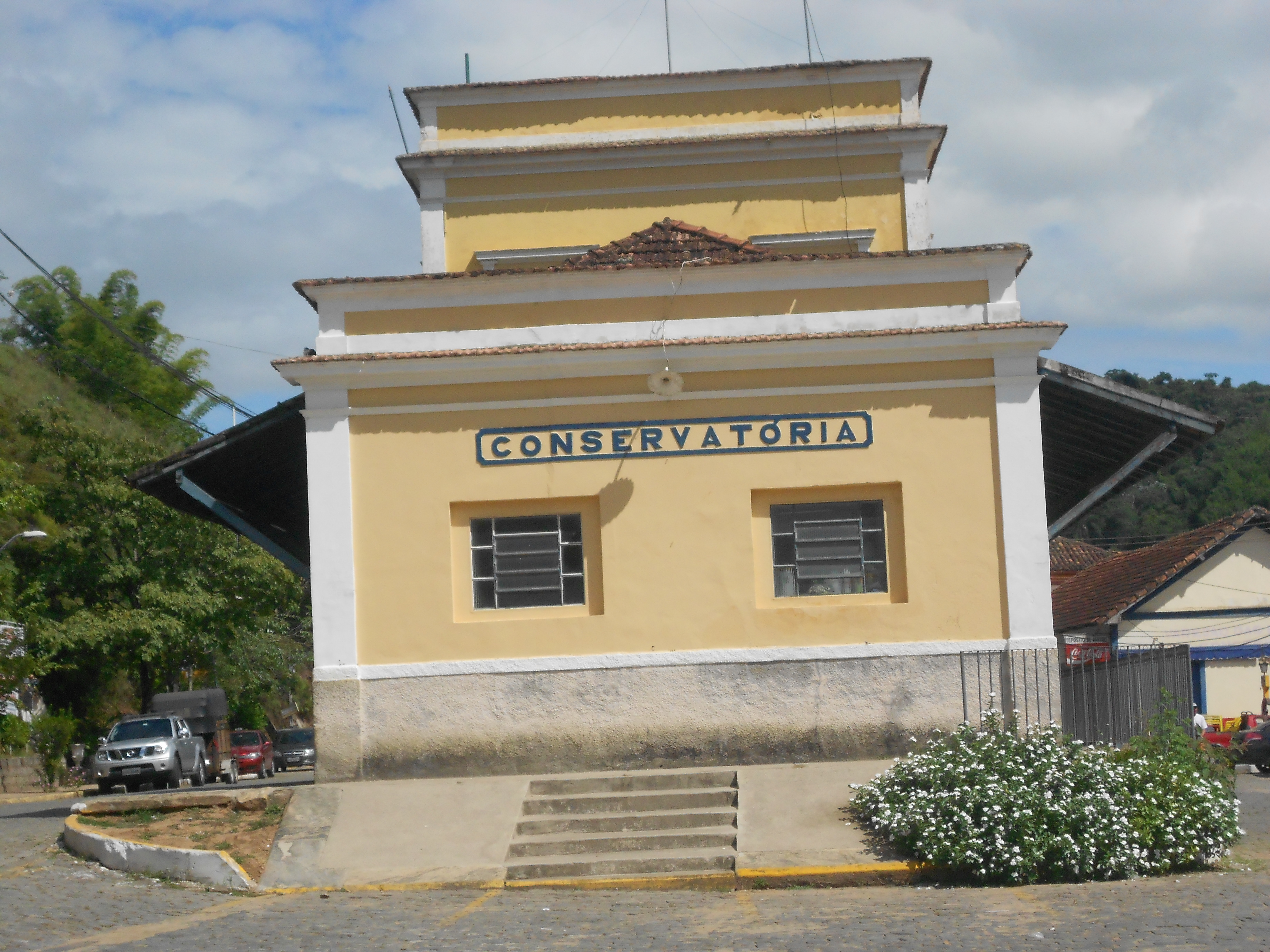 Distrito de Conservatória, pertencente ao município de Valença, Rio de Janeiro, Brasil.